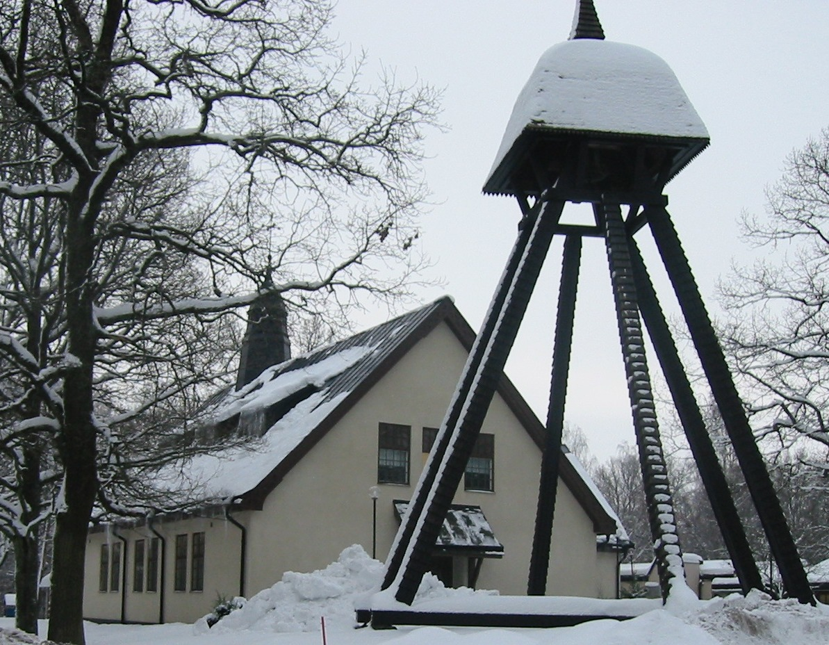 Viksängskyrken i Västerås.